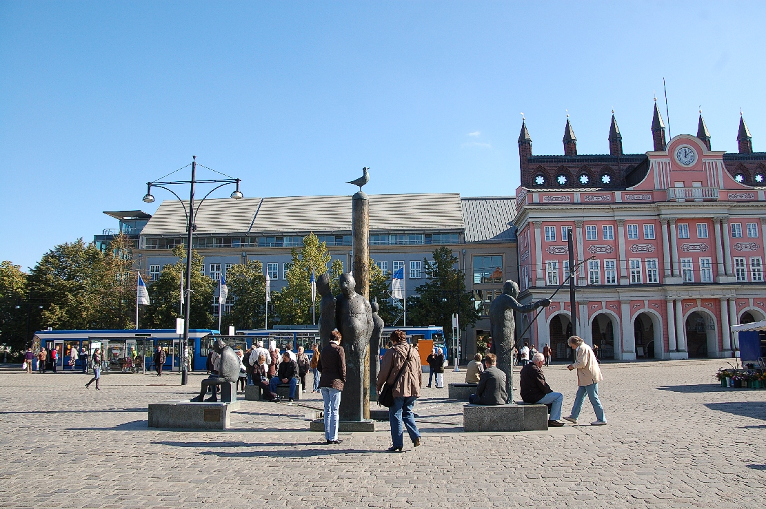 Rathaus, Neuer Markt mit Mövenbrunnen Rostock